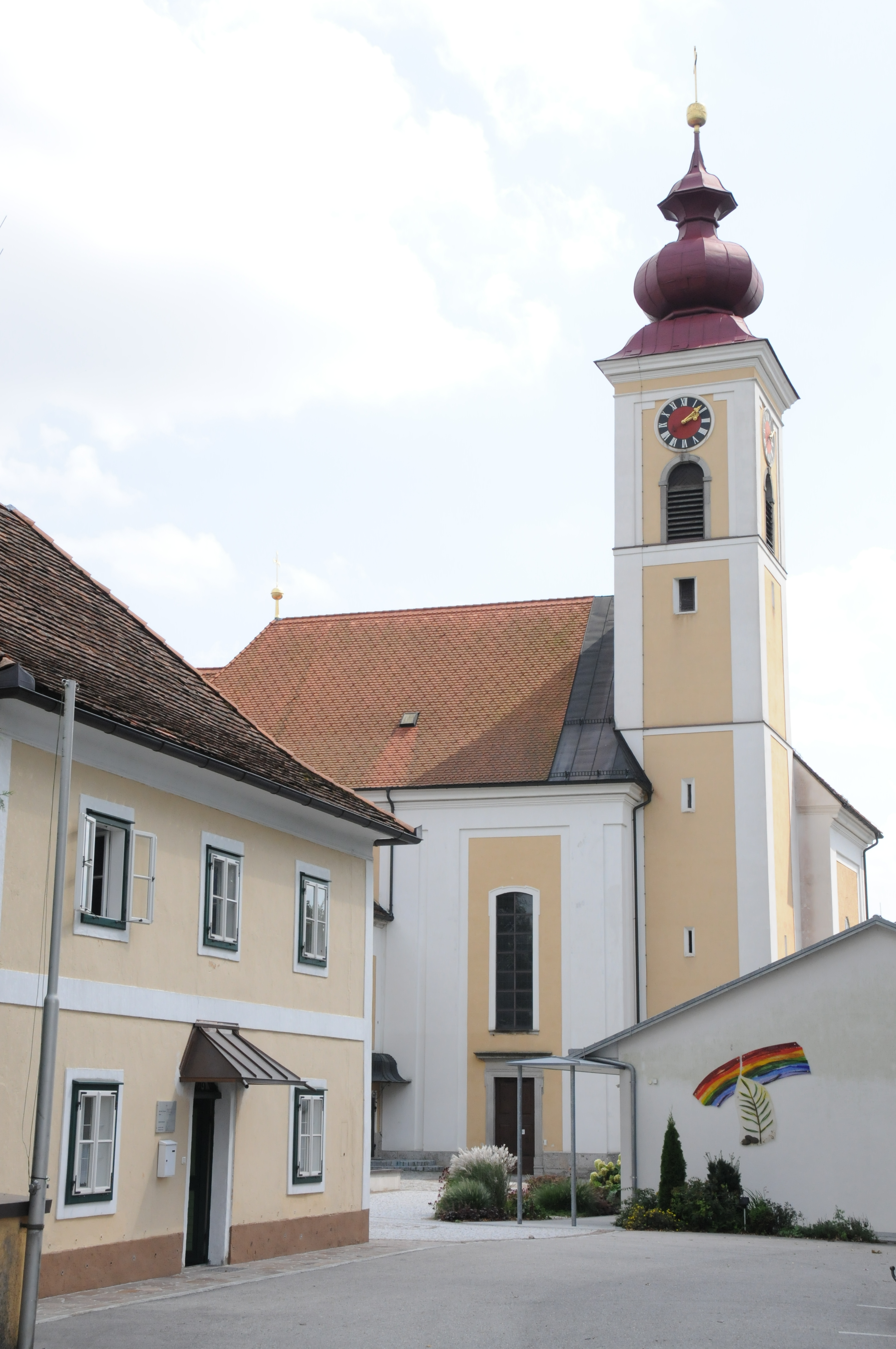 Kath. Pfarrkirche hl. Stephan